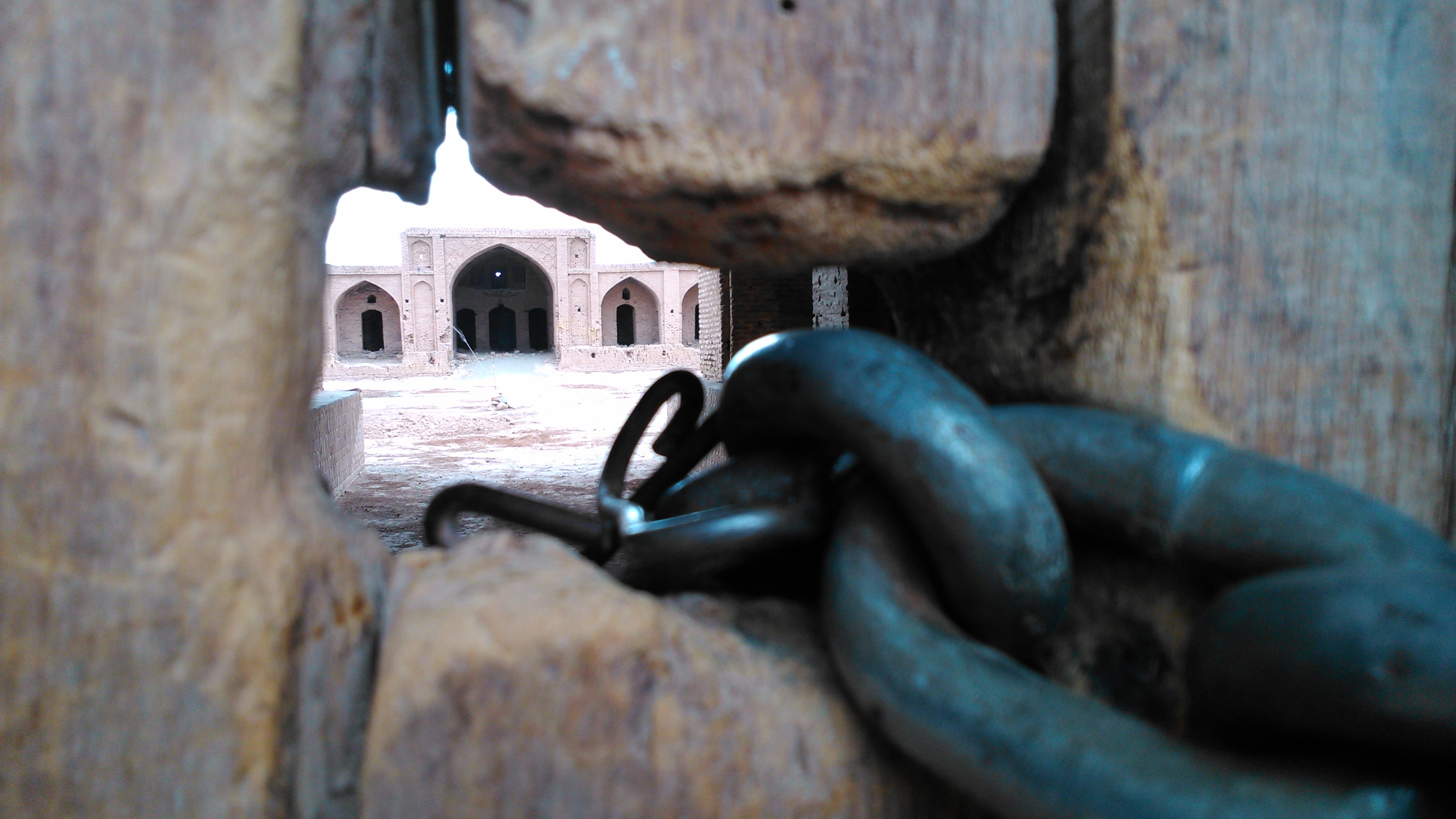 این تصویر توسط رامین کریمی در روز جمعه 25 مهرماه سال 1393 ساعت ۱۵:۳۷ بعد از ظهر از کاروانسرای شاه عباسی ایوانکی در حالی که درب ورودی با زنجیر قفل شده بود، تهیه شده است